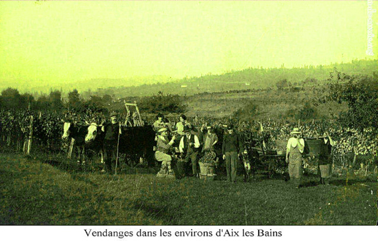 Vendanges au château Boncelin à Chantemerle,, près d'Aix-les-Bains